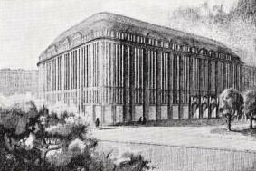 Valter Thomé & Ivar Thomé, suunnitelma Stockmannin tavarataloksi, suunnitelukilpailun 1. palkinto 1916